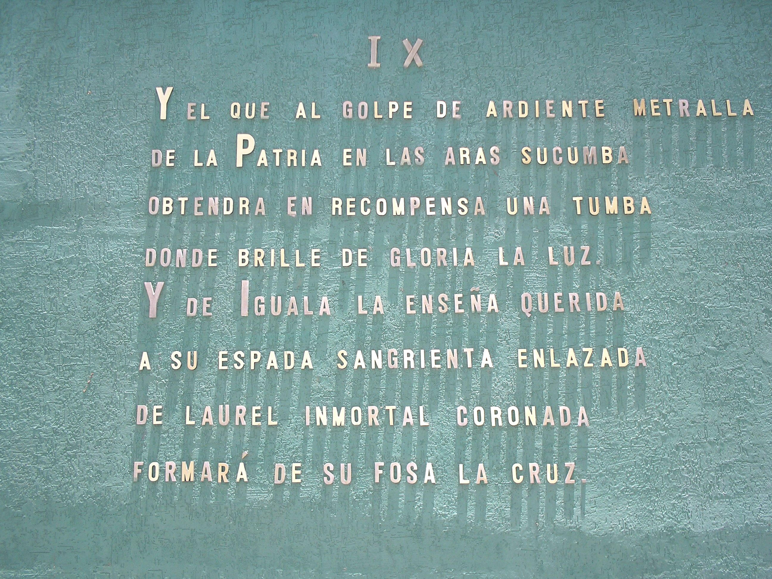 Estrofa IX del Himno Nacional Mexicano en el cual menciona a la ciudad de Iguala, unica ciudad mencionada en todo este Himno.